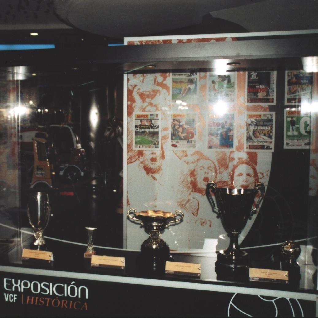 Trofeos Valencia CF